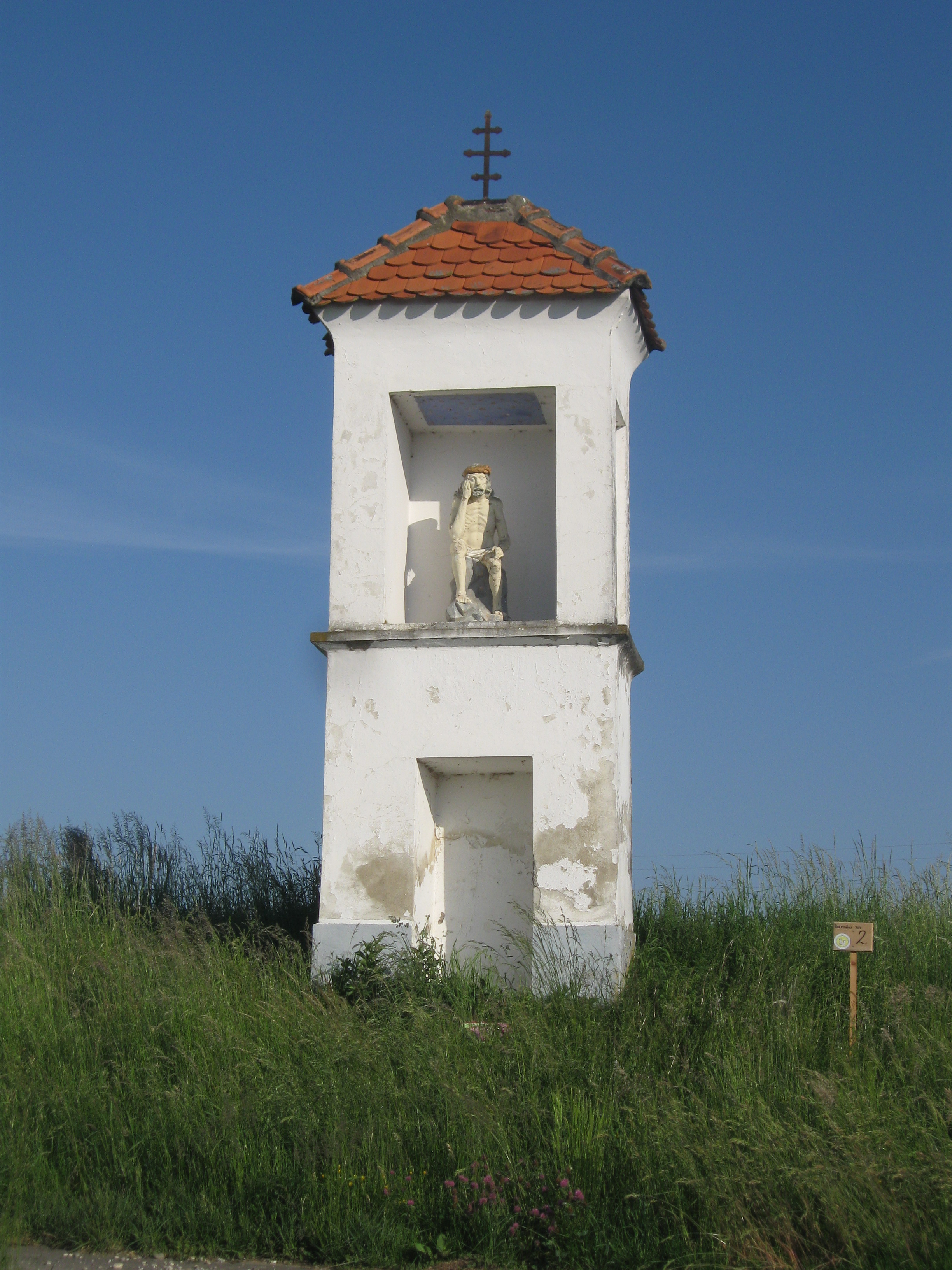 Znamenje iz leta 1788. V zornji niši je kip. Pokrito je z opečno kritino.